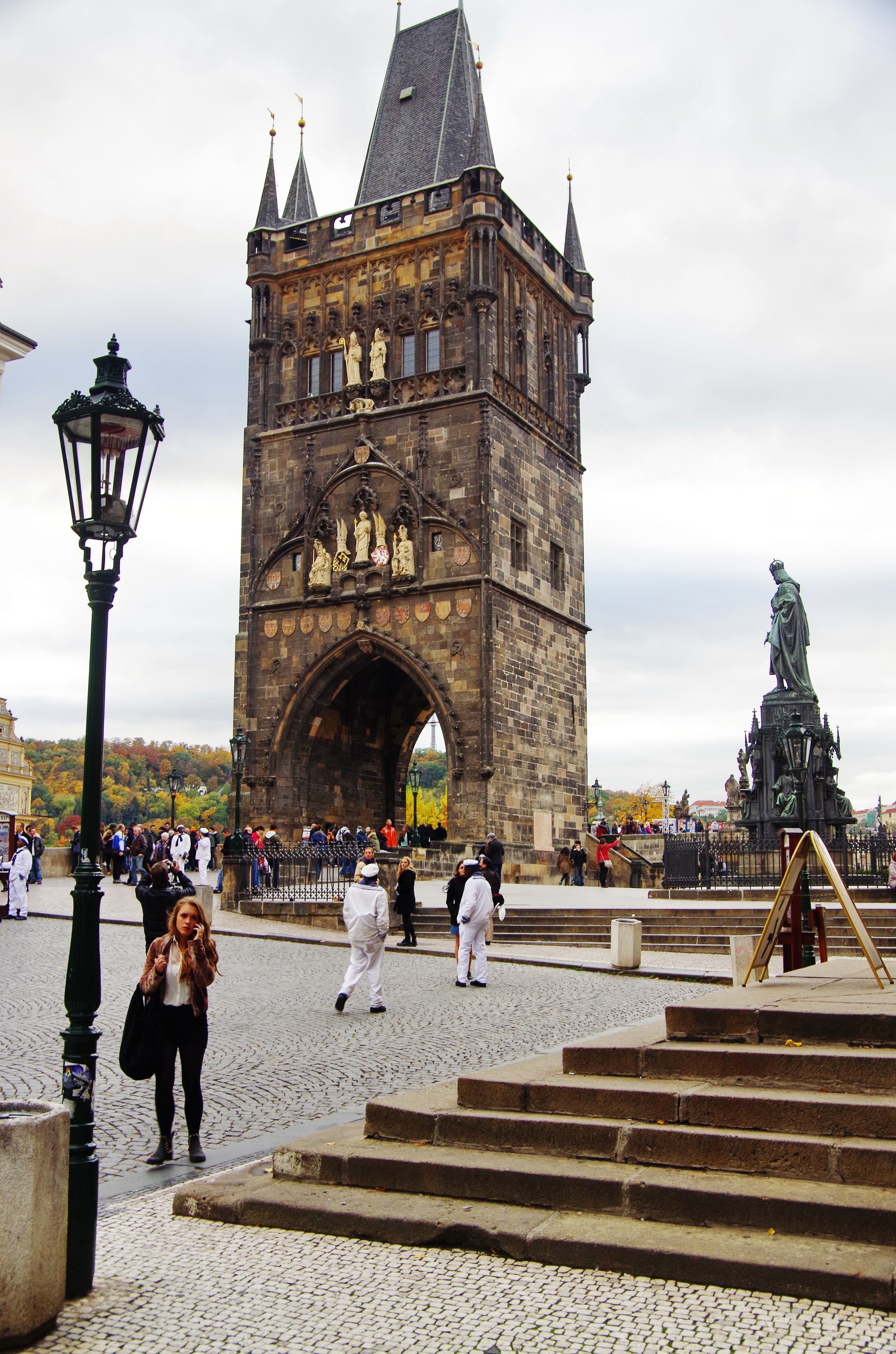 Karlsbrücke Altstädter Brückenturm